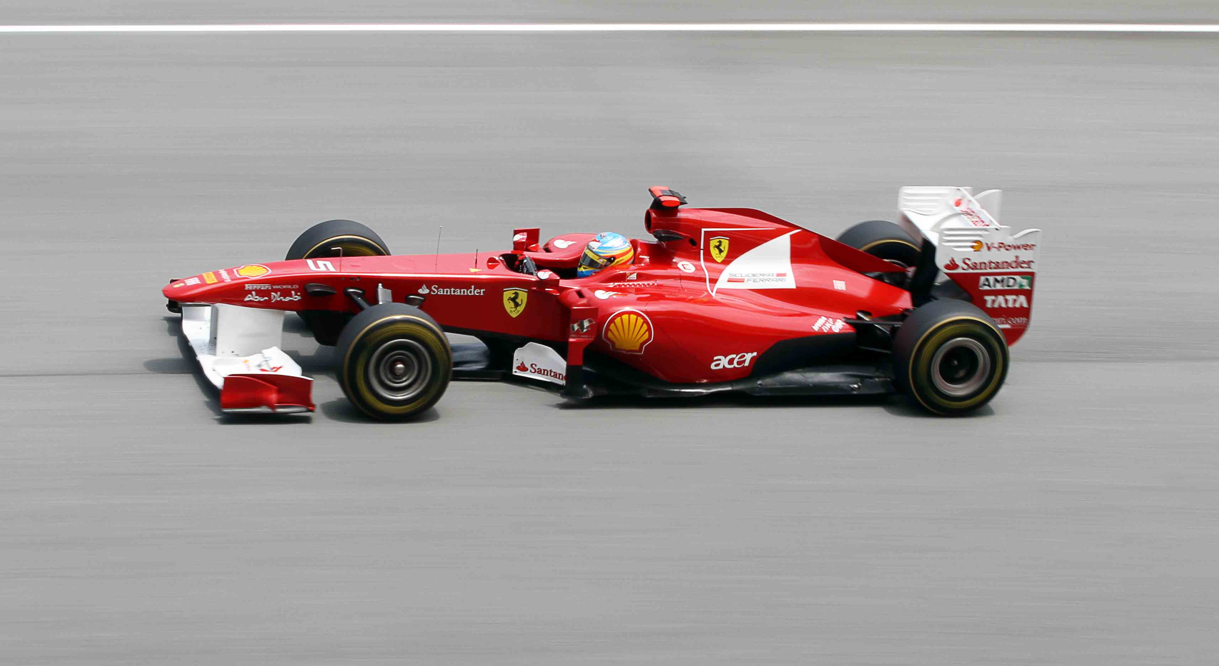 Malaysia F1 GP 2011